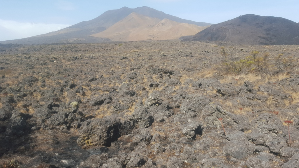 Beautiful views on Mount Cameroon National Park, located in the South west region of Cameroon.